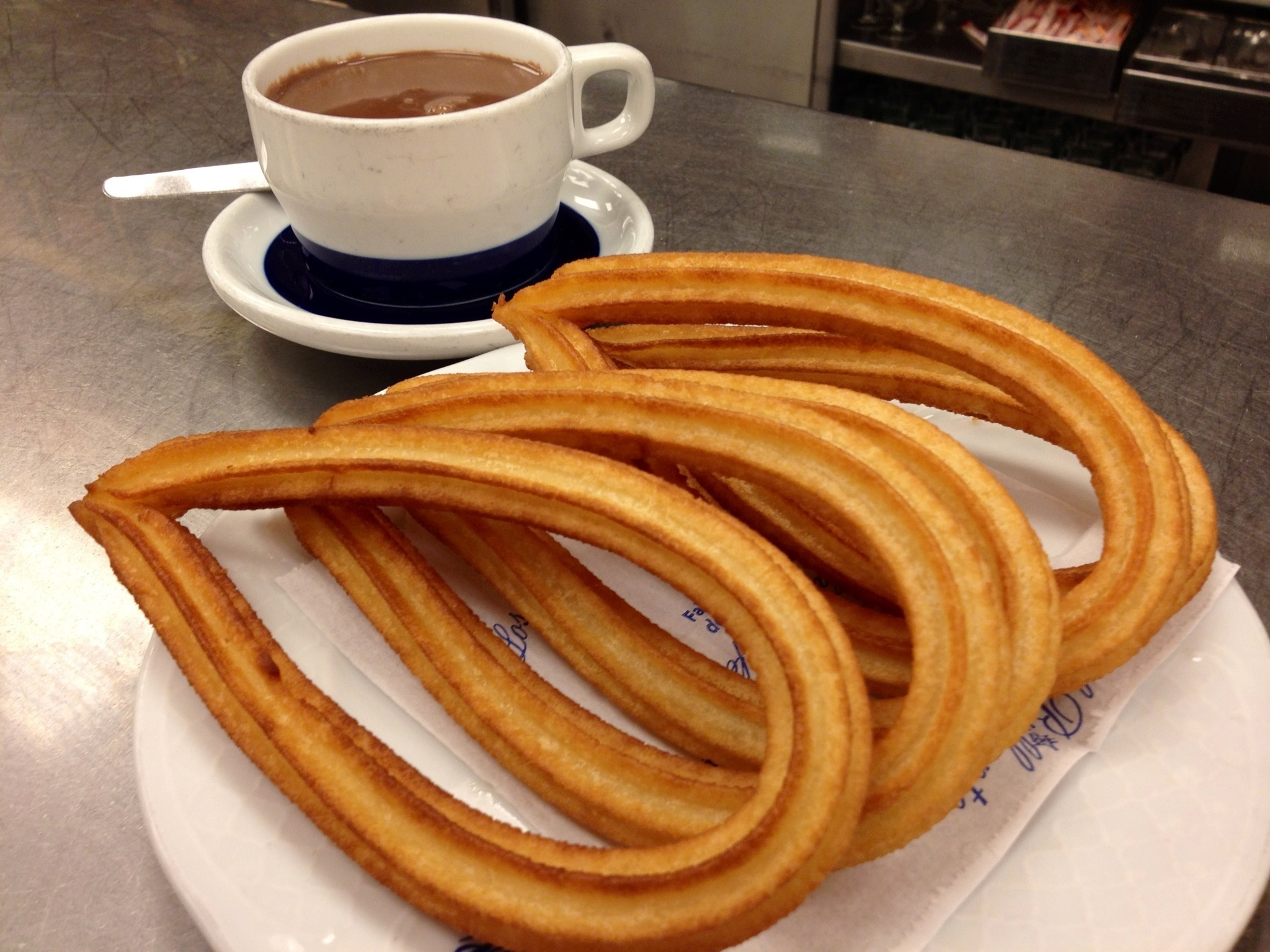 Chocolate a la taza con churros de lazo, en Madrid.